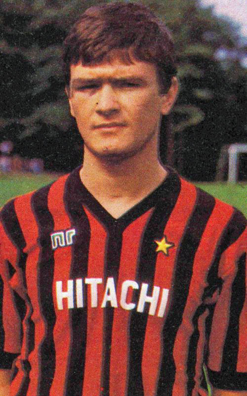 Aldo Serena con la maglia del Milan